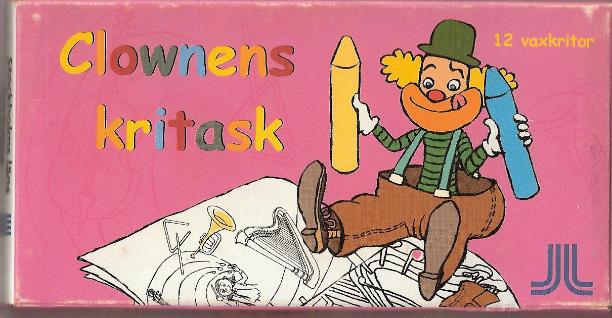 Clownens kritask skapades åt Stockholms Läns Landsting och användes i kombination med Clownens målarbok som delades ut på sjukhus och vårdcentraler. Illustratör Nisse Lindberg